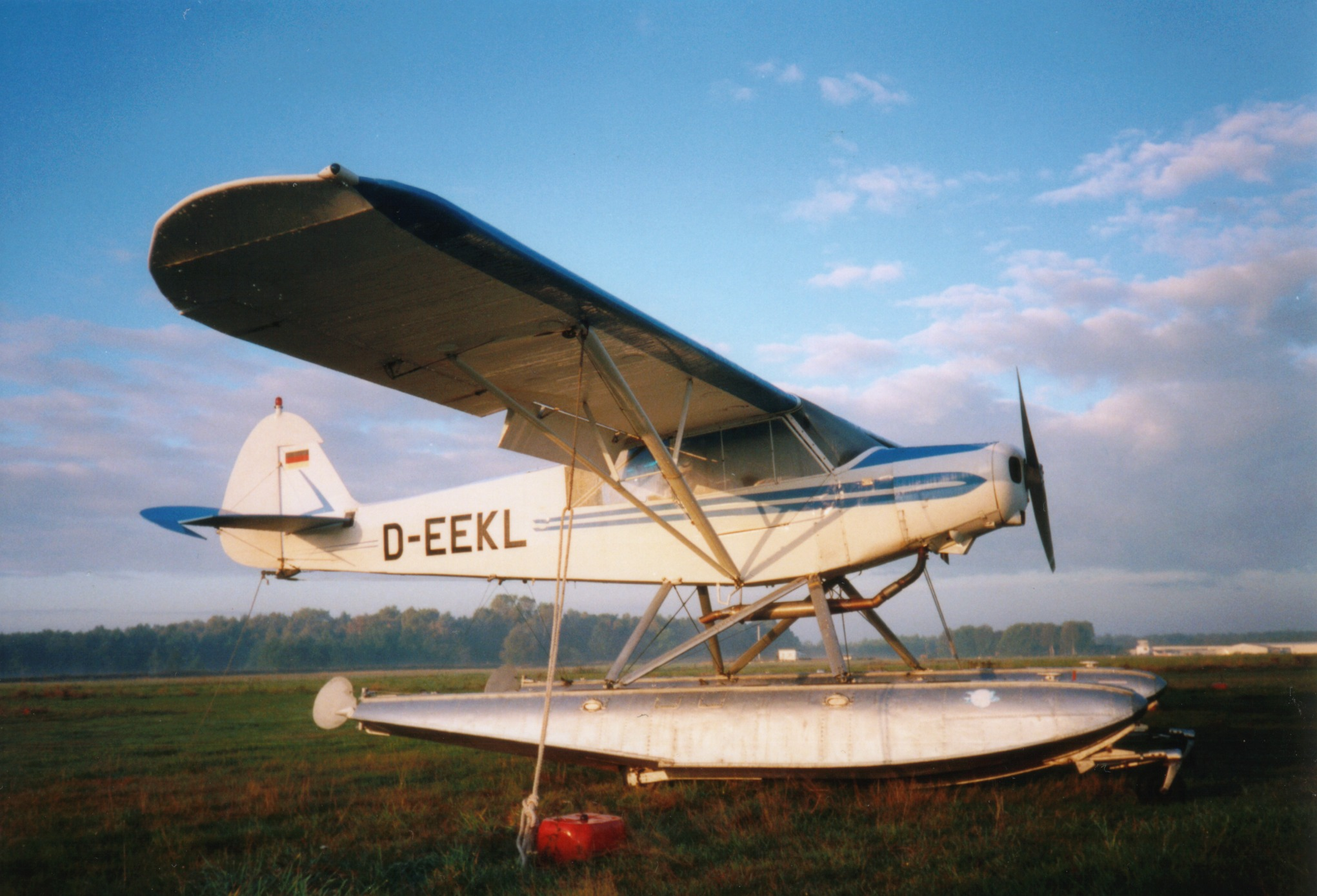 Piper PA 18 auf Kufen als Wasserflugzeug. Flugplatz Uetersen.